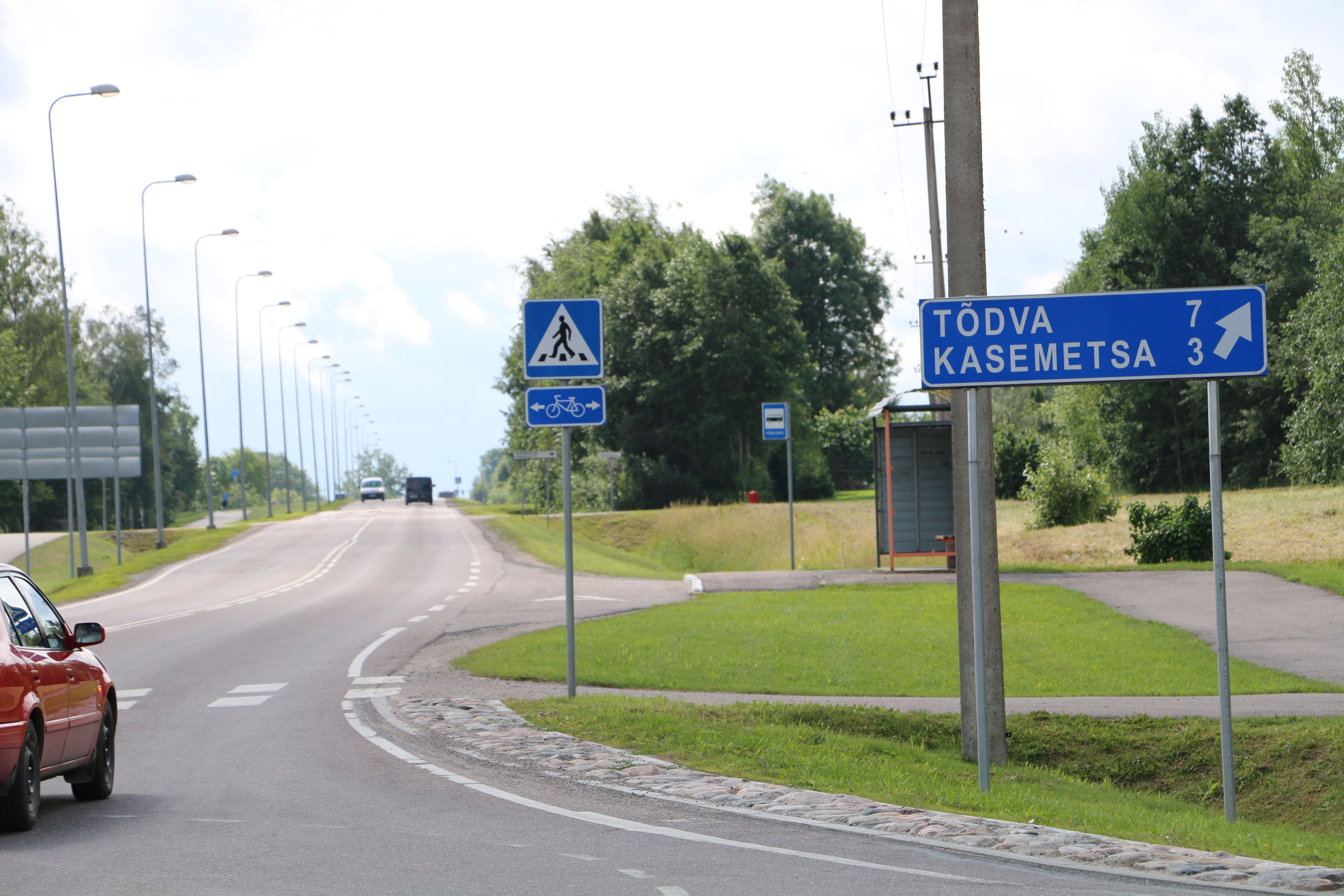 Saku-Tõdva tee Tallinna maanteelt vaadatuna